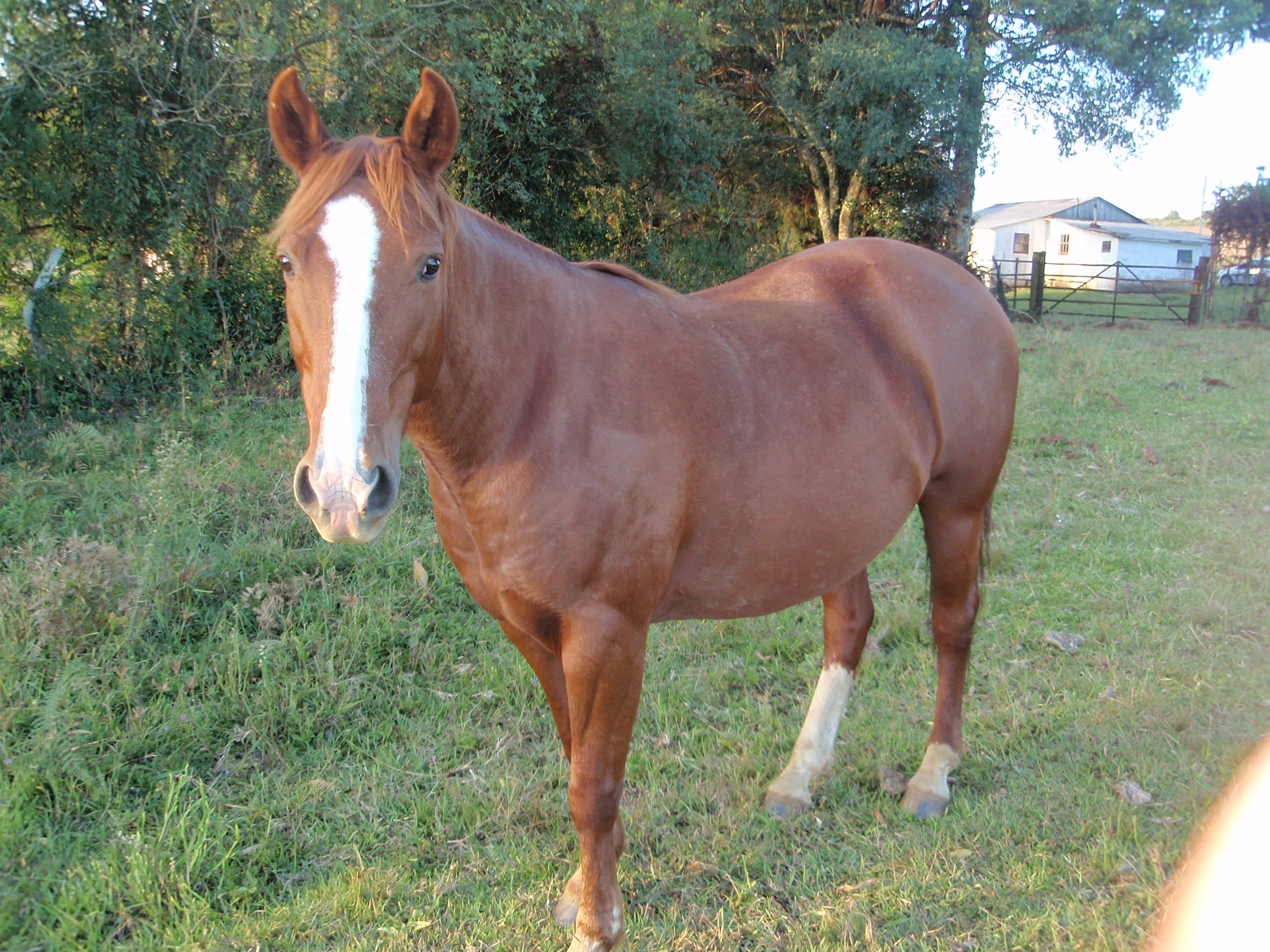 cavo em monte alegre dos campos